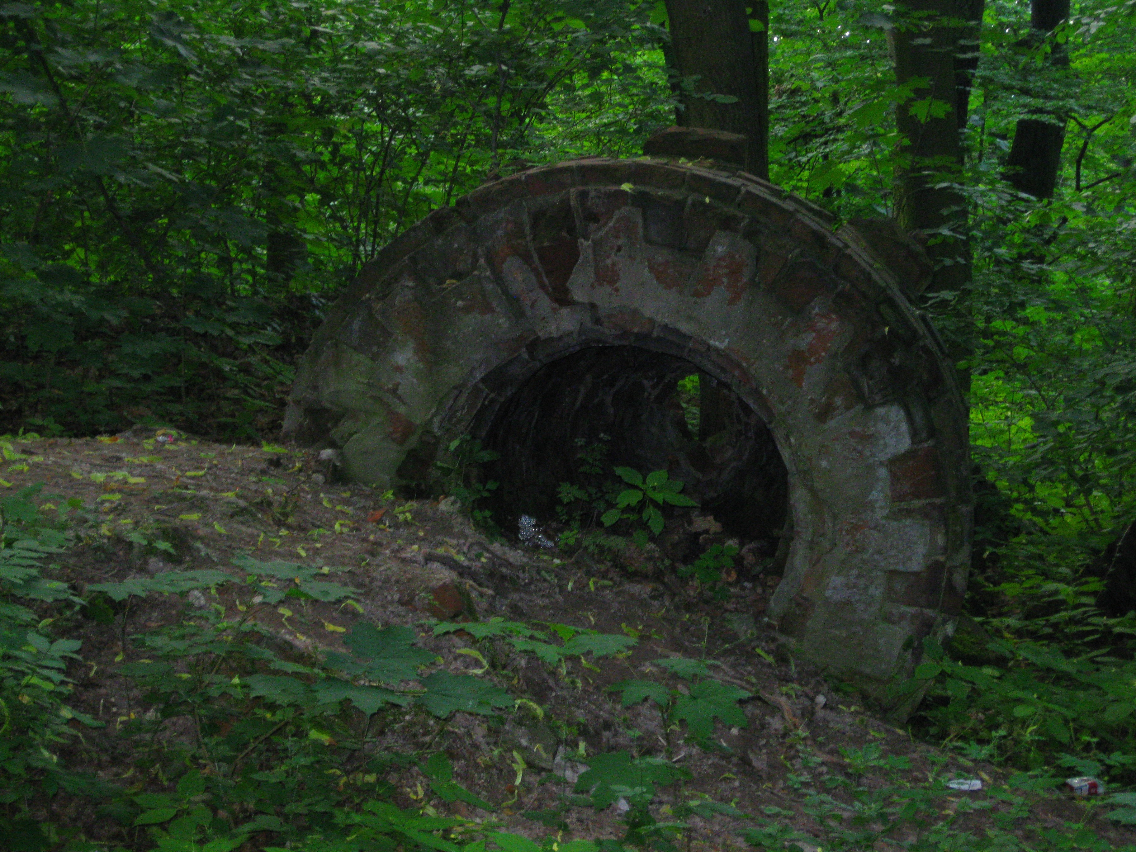 Pozostałości wieży Kleista w Parku Rozrywki i Rekreacji w Słubicach.